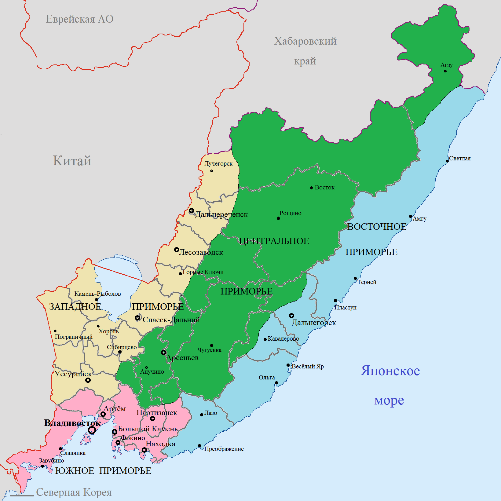 Tourist regions of Primorsky Krai